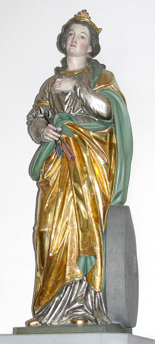 Hl. Christina von Bolsena, Skulptur von Moriz Schlachter, Pfarrkirche St. Christina, Ravensburg